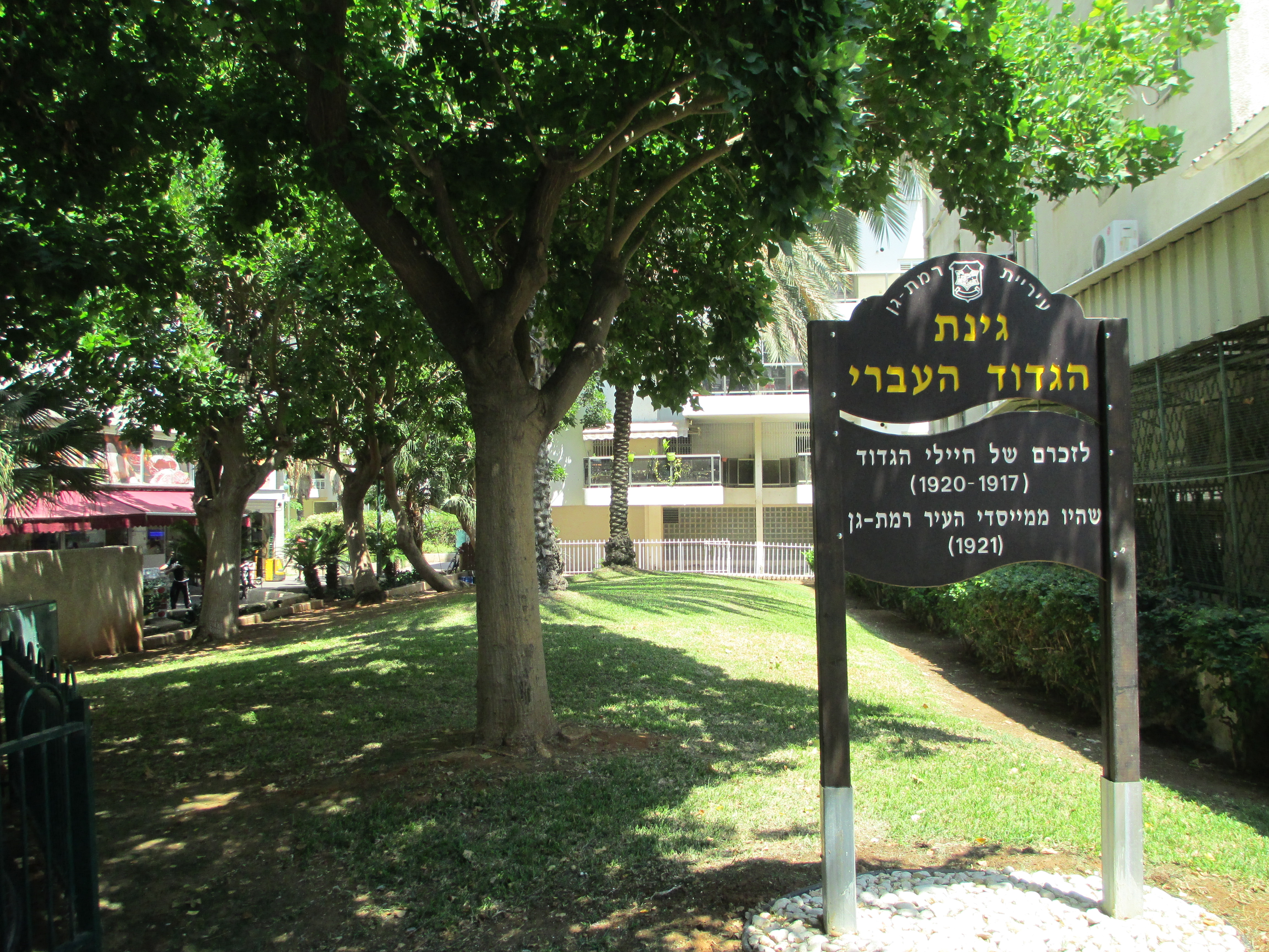 גינת הגדוד העברי ברמת גן